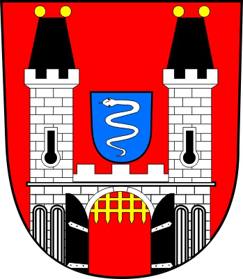 Rataje nad Sázavou znak